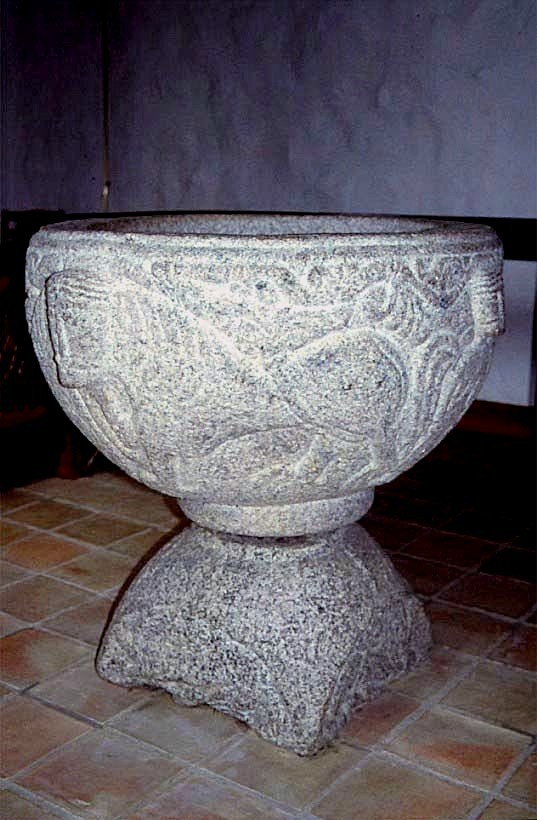 Tulstrup Kirke, Skanderborg Kommune - Døbefont våbenhusets dør